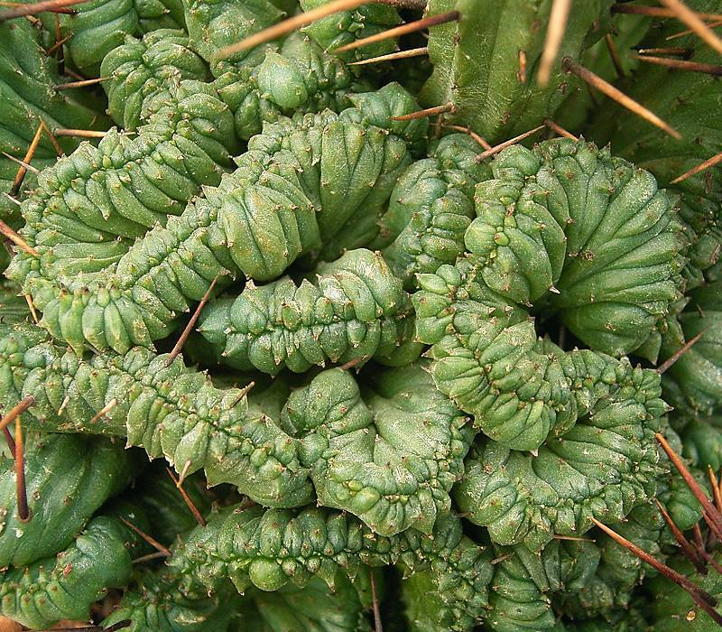 Euphorbia enopla fa. cristata